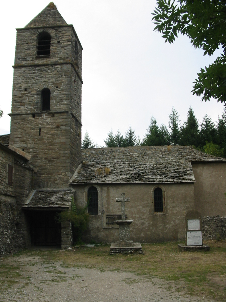 Rosis (Hérault) - Notre-Dame de Douch et Stèle au maquis Bir-Hakeim